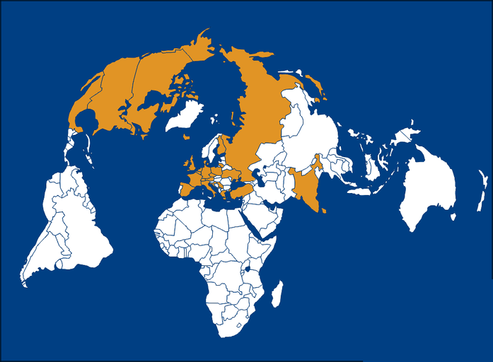 pays partenaire de Chantiers jeunesse